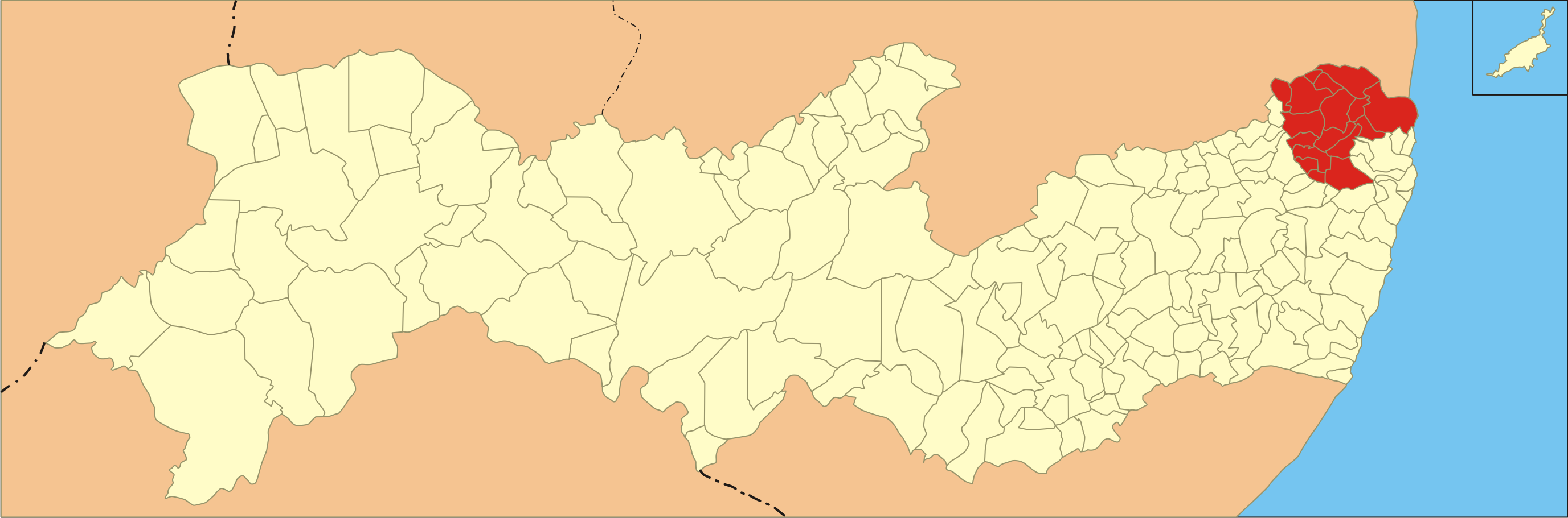 Localização da microrregião no estado de Pernambuco.